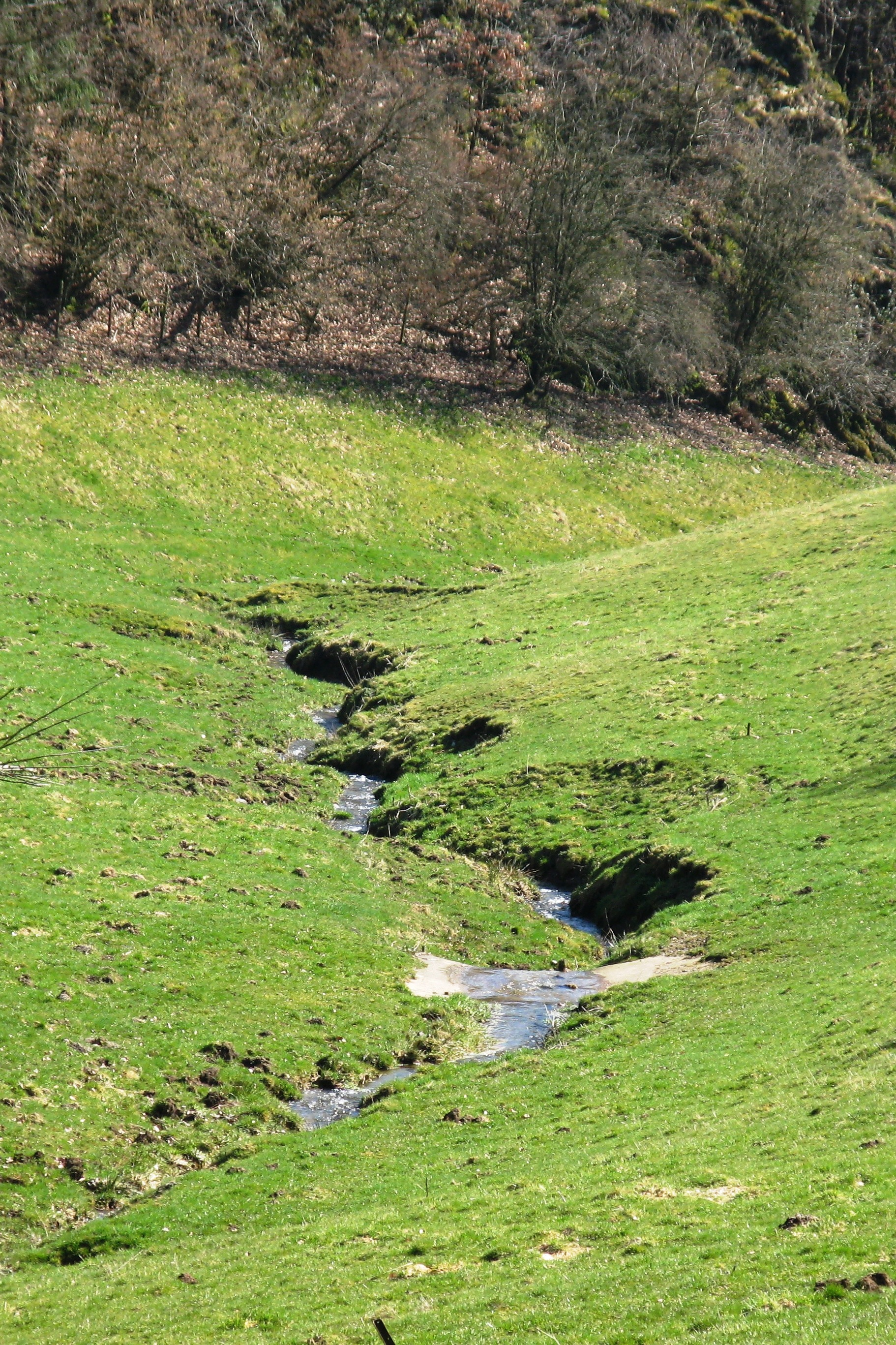 D'Breschterbaach léaanscht d'Schuerelserknupp Flouer Fuurtbierg.